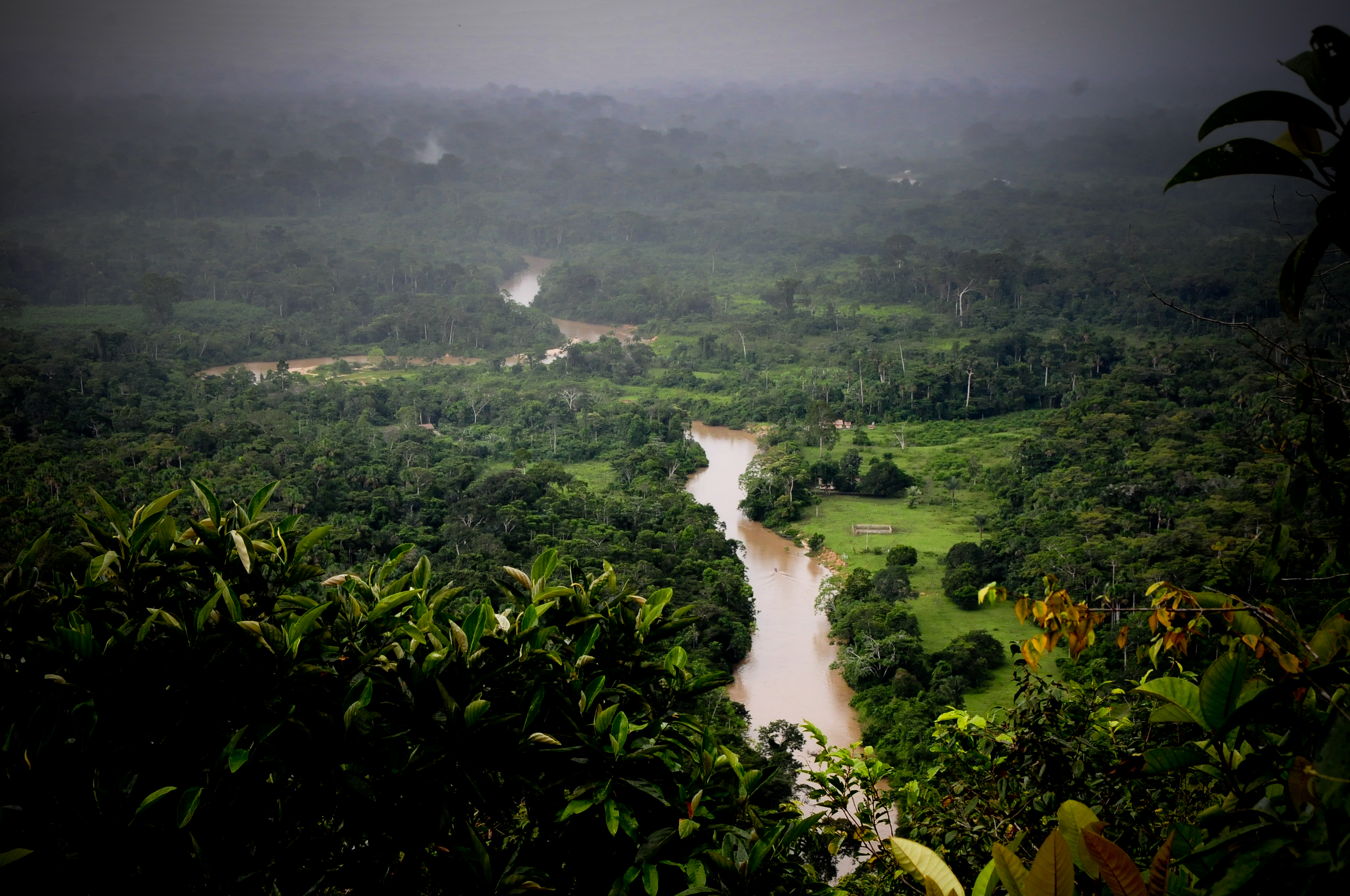 O Parque Estadual Chandless é o segundo maior parque da região norte do Brasil, e a segunda maior Unidade de Conservação do Estado do Acre, possuindo 695.303 hectares, ou cerca de 4 % da área do estado. Foi criado pelo Decreto 10.670, de 2 de setembro de 2004.